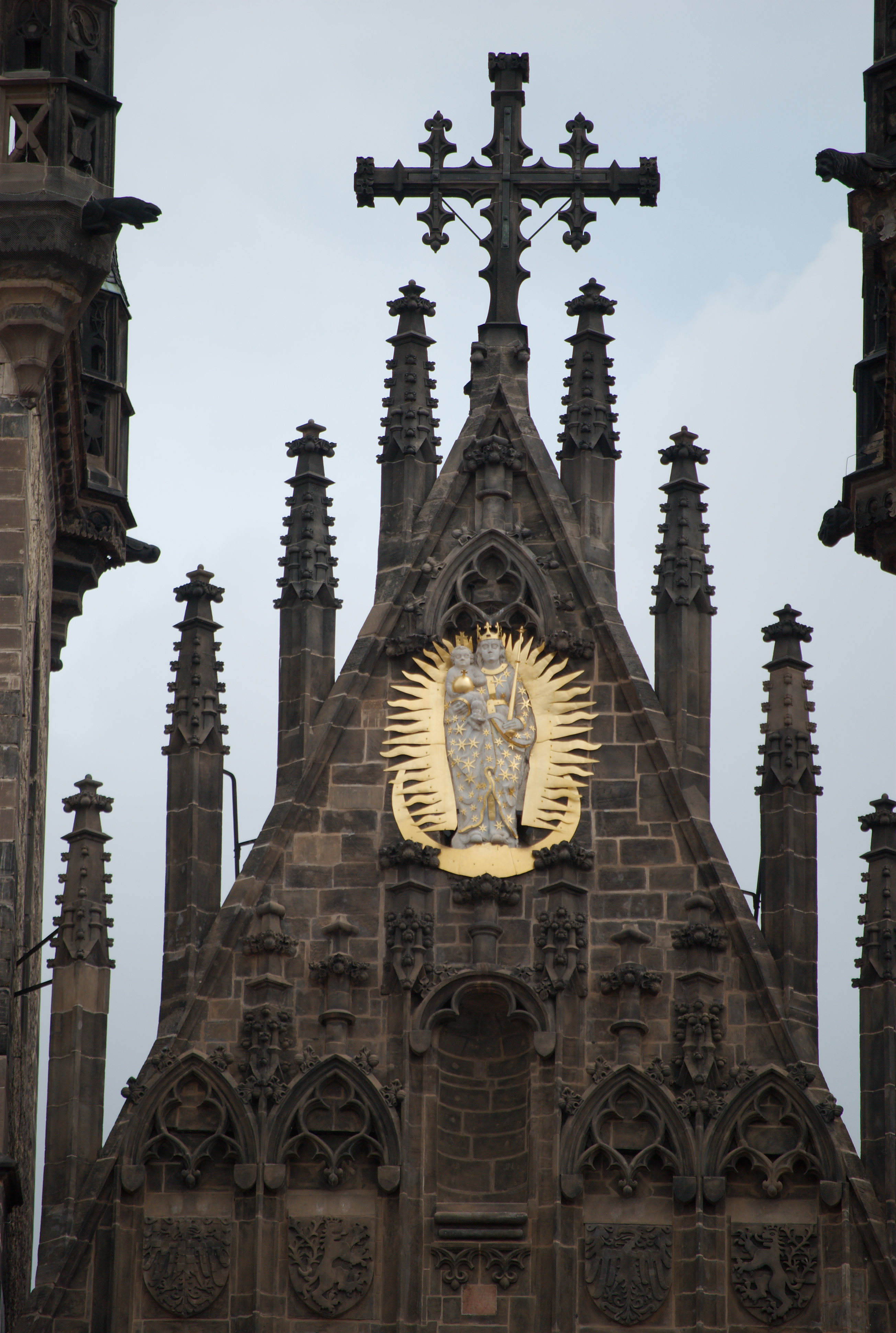 Panna Marie s Jezulátkem na štítu střechy Týnského chrámu v Praze na Starém městě